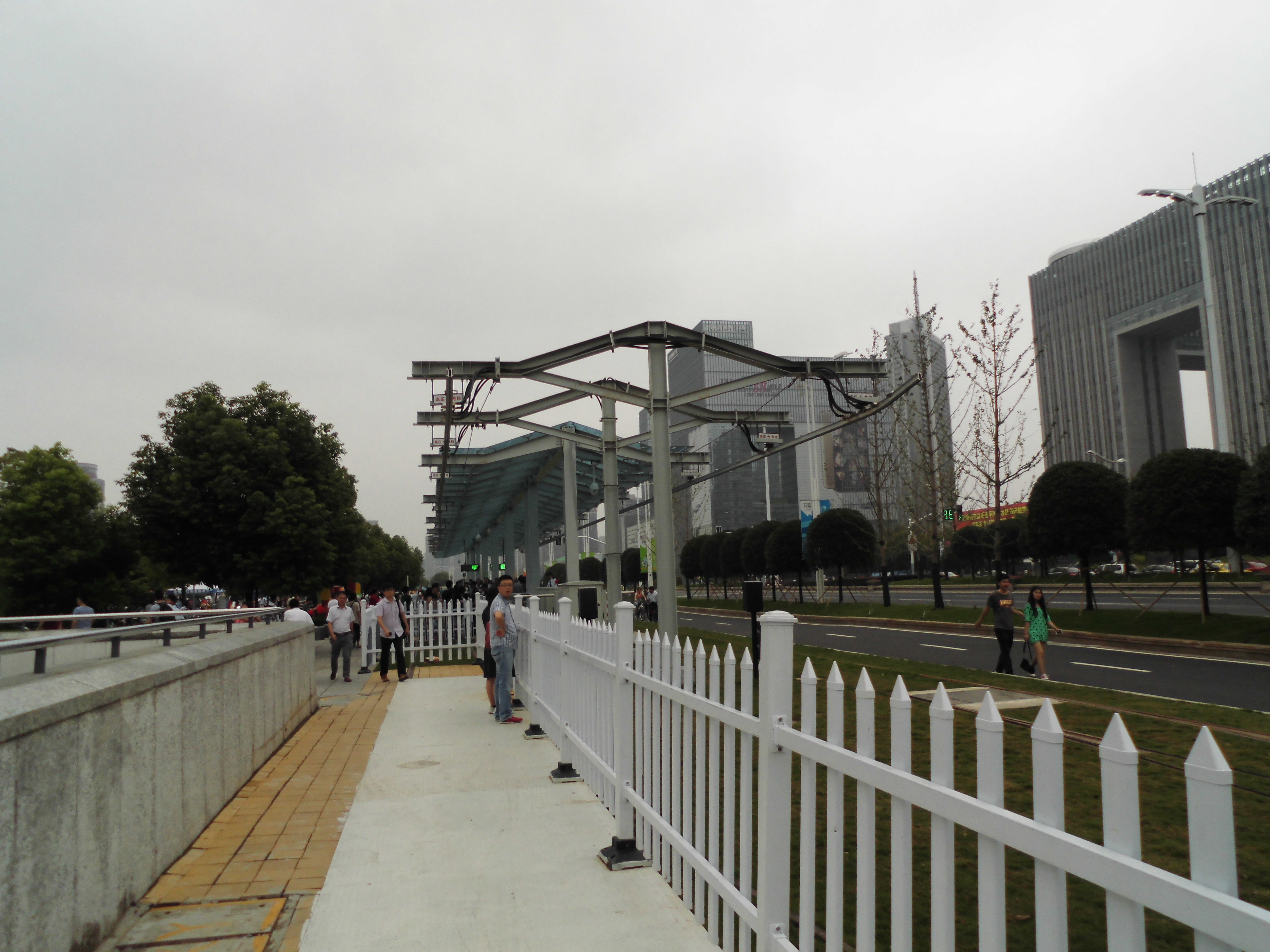 南京有轨电车1号线起点站